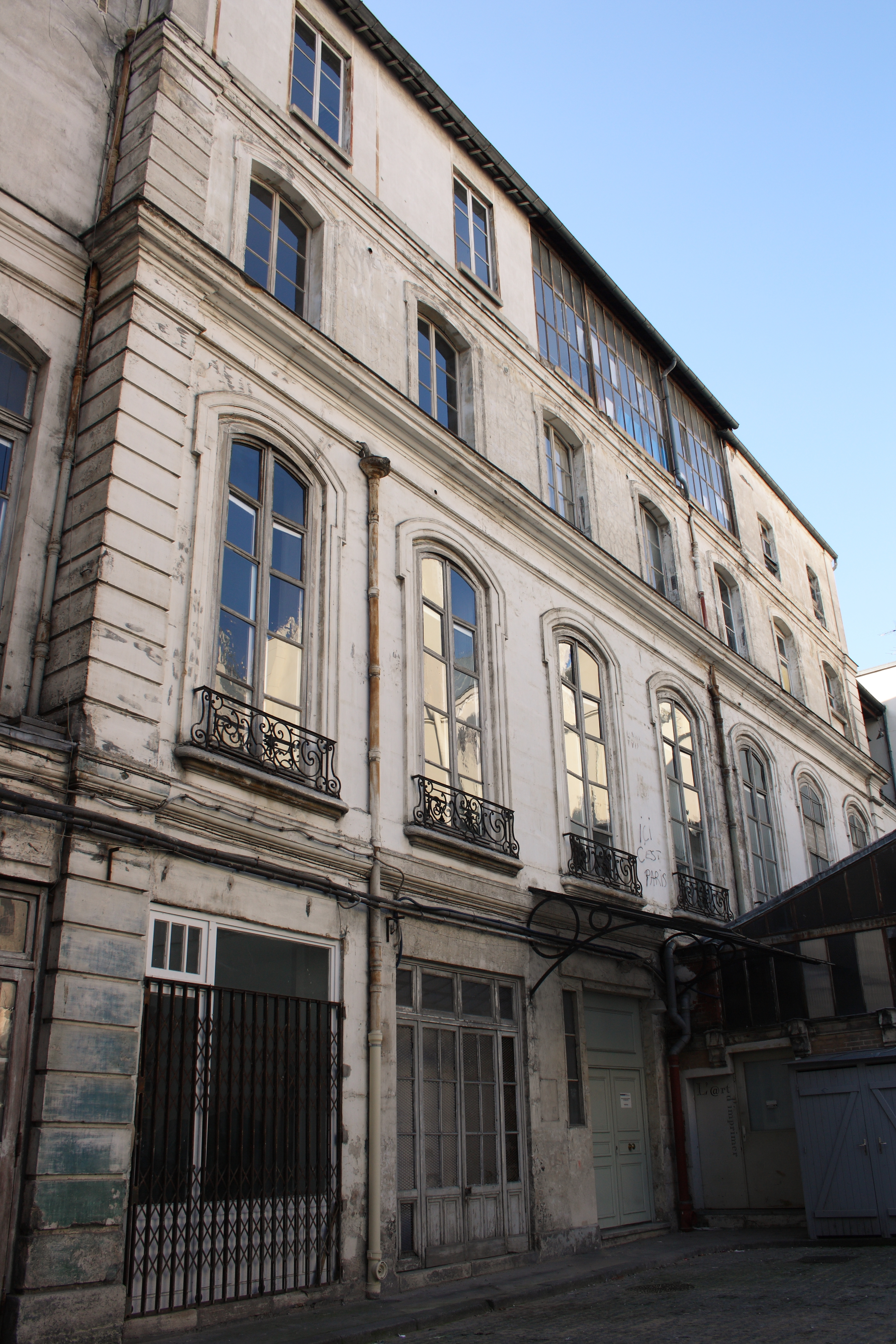 Haus 9, 11 rue Cadet in Paris (9. Arrondissement)